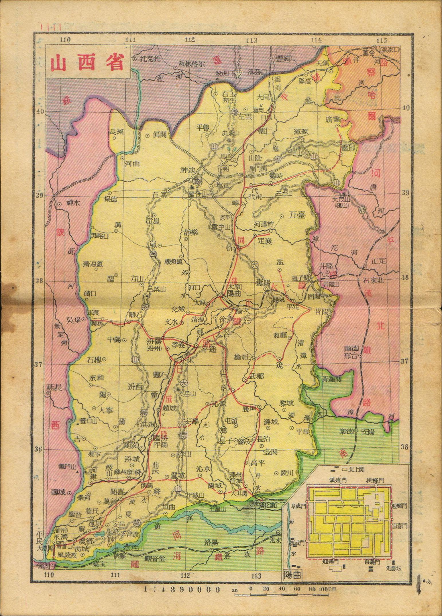 亚新地学社1936年《袖珍中华全图》山西省